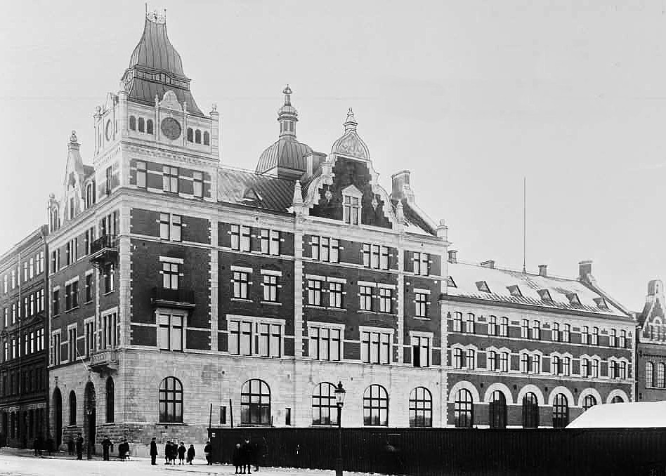 Separators byggnad mot Feminggatan